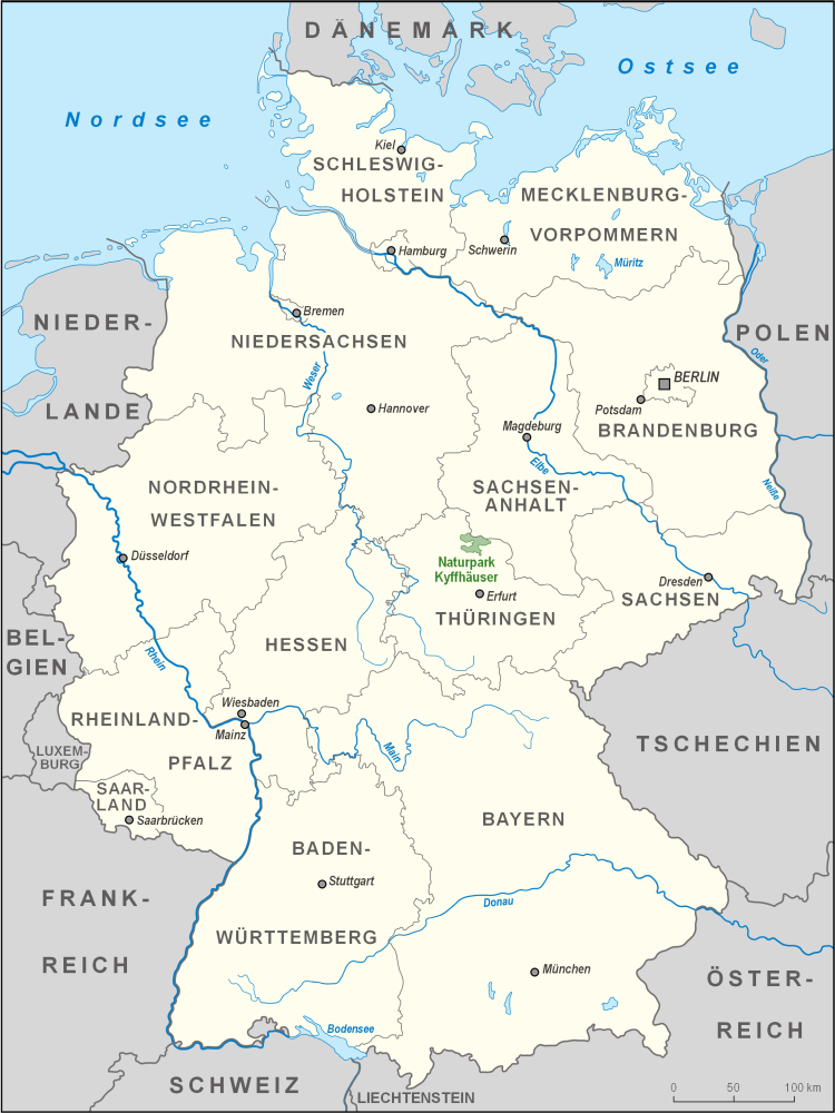 Karte des Naturparks Kyffhäuser in Deutschland